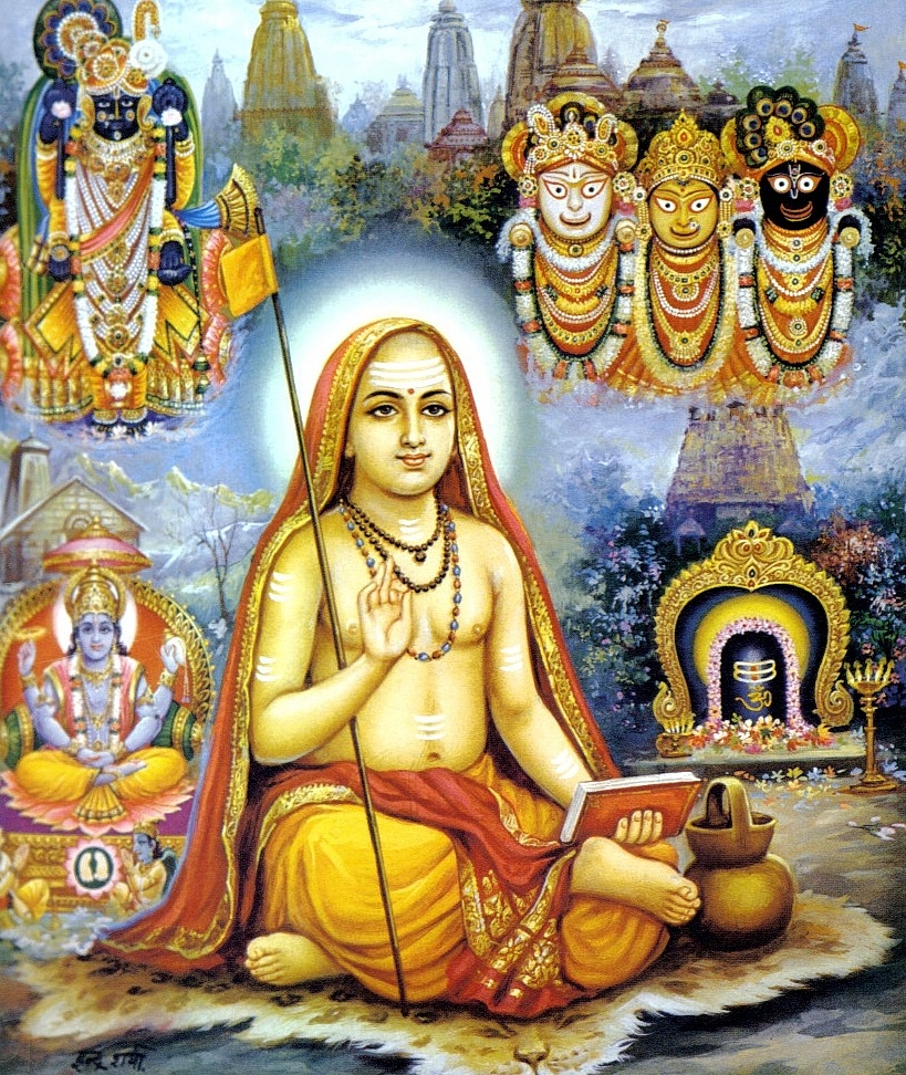 Шанкарачарья